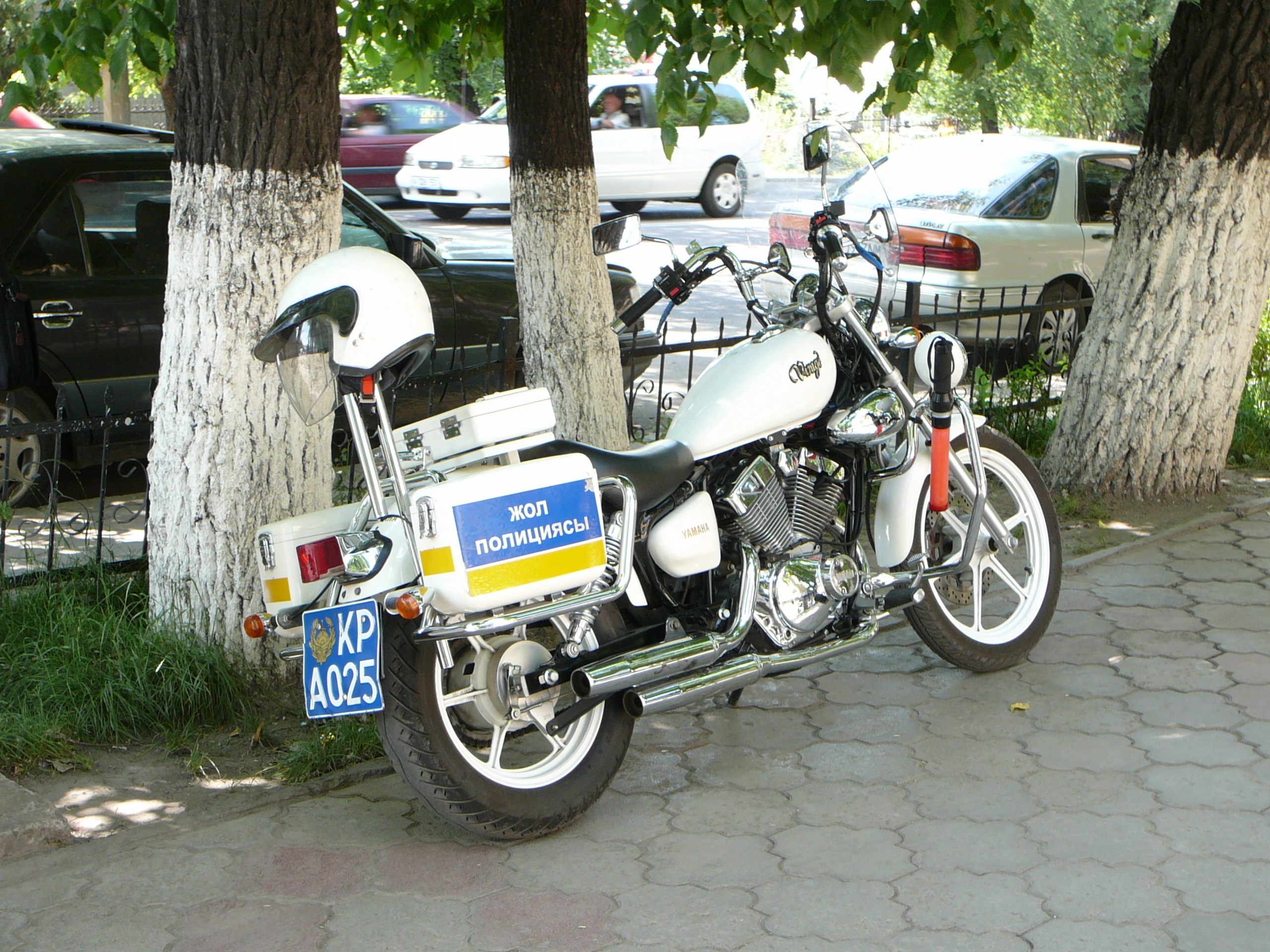 Номер полицейского мотоцикла для МВД Республики Казахстан, имеет такой же формат как и на автомобиле - стандартный номер для юридического лица - в формате буква, три цифры и две буквы. Разница в цветовой гамме - белые символы на синем фоне. Номер следует читать как A025KP. "А" - г.Алма-Ата.